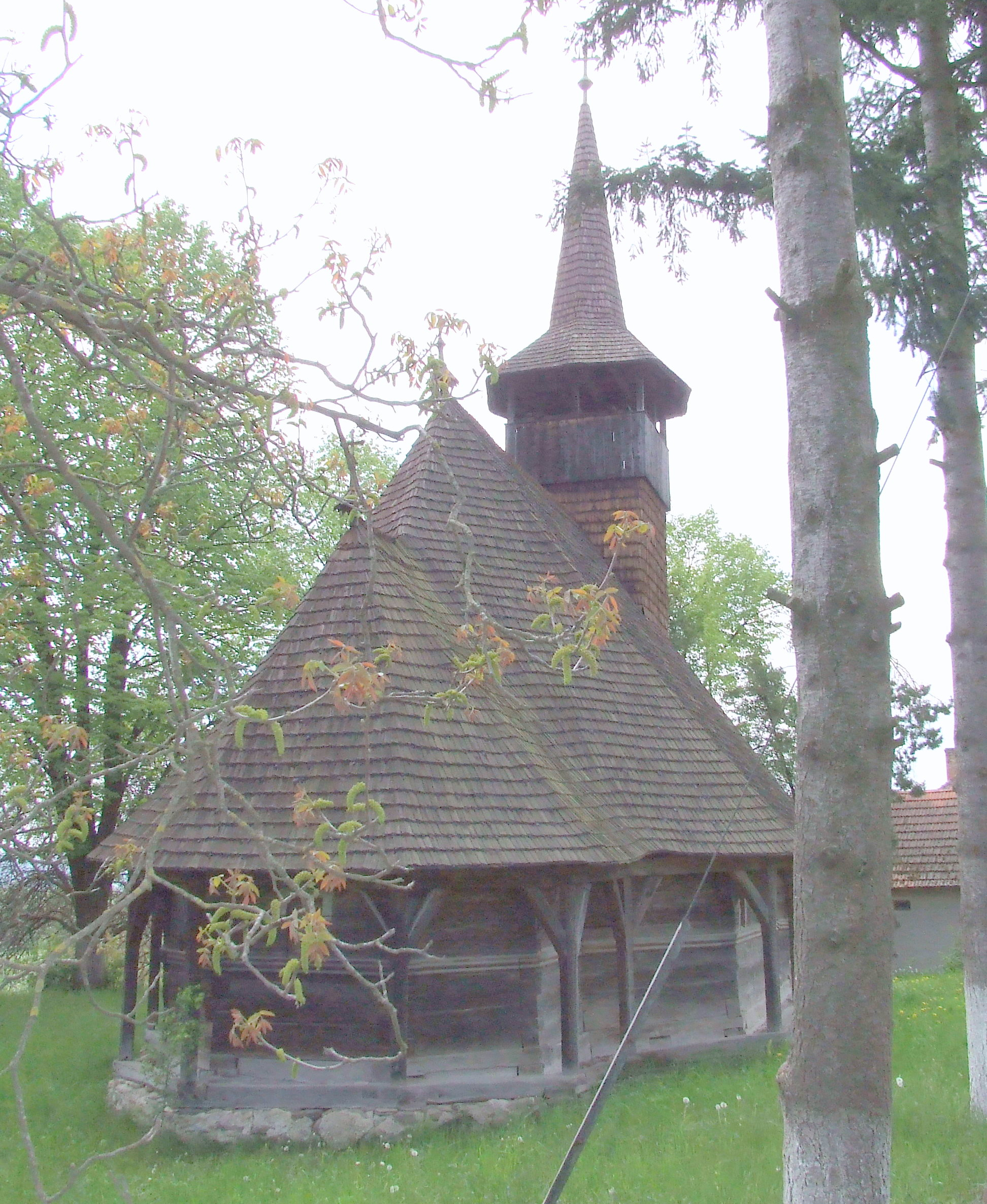 Biserica de lemn din Luncşoara, judeţul Bihor